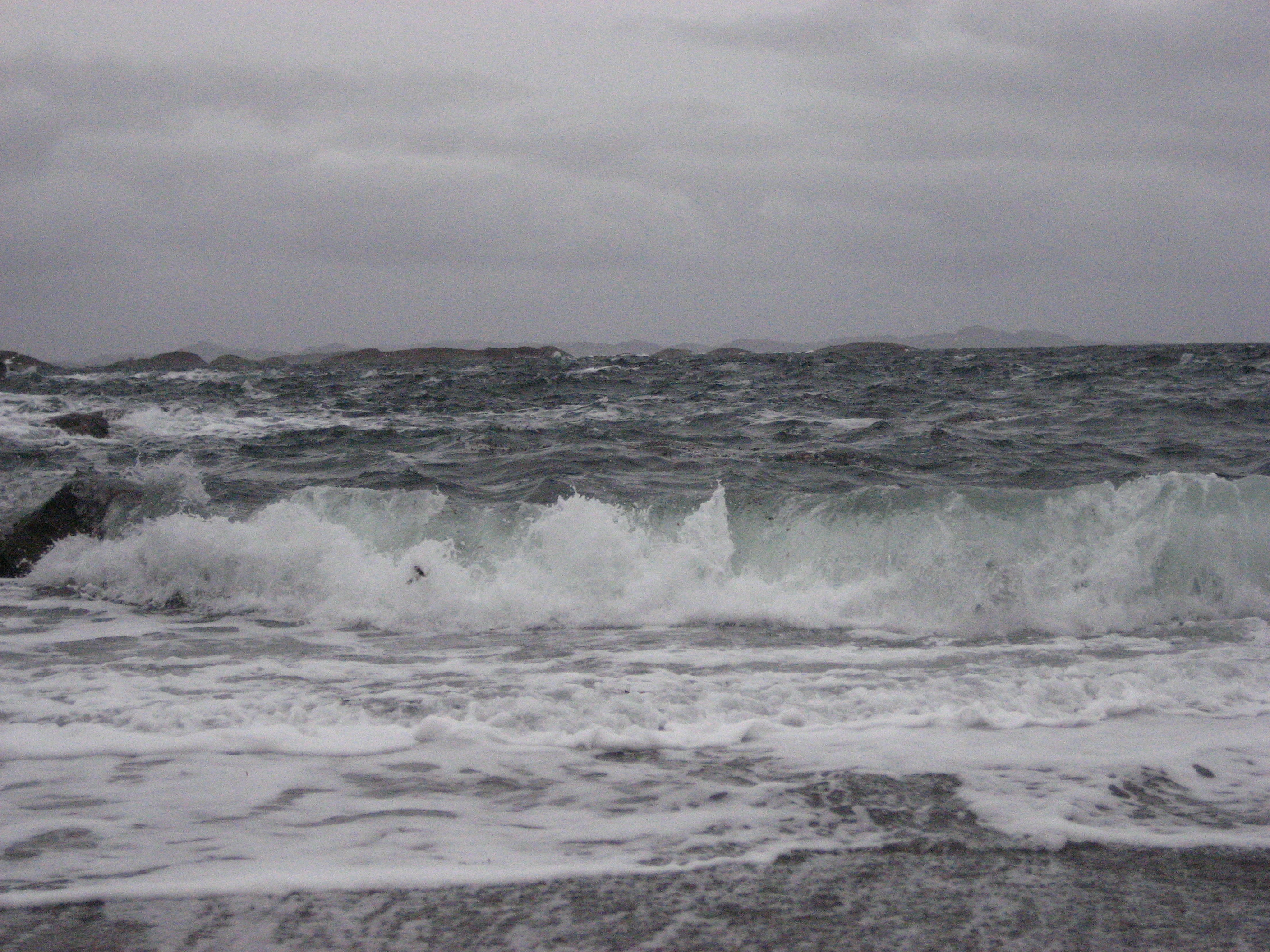 Waves breaking in Liss-klungvika on Gjerdinga island, Norway Feb 03 2007.